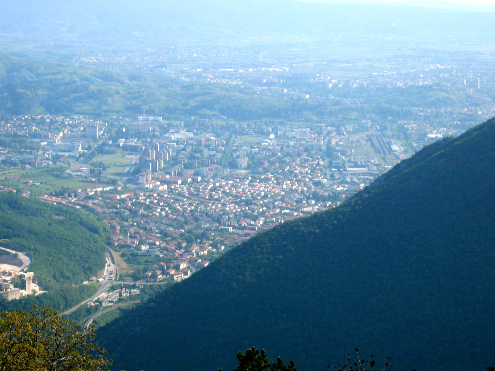 Nova gorica (view from Sveta Gora), Slovenia